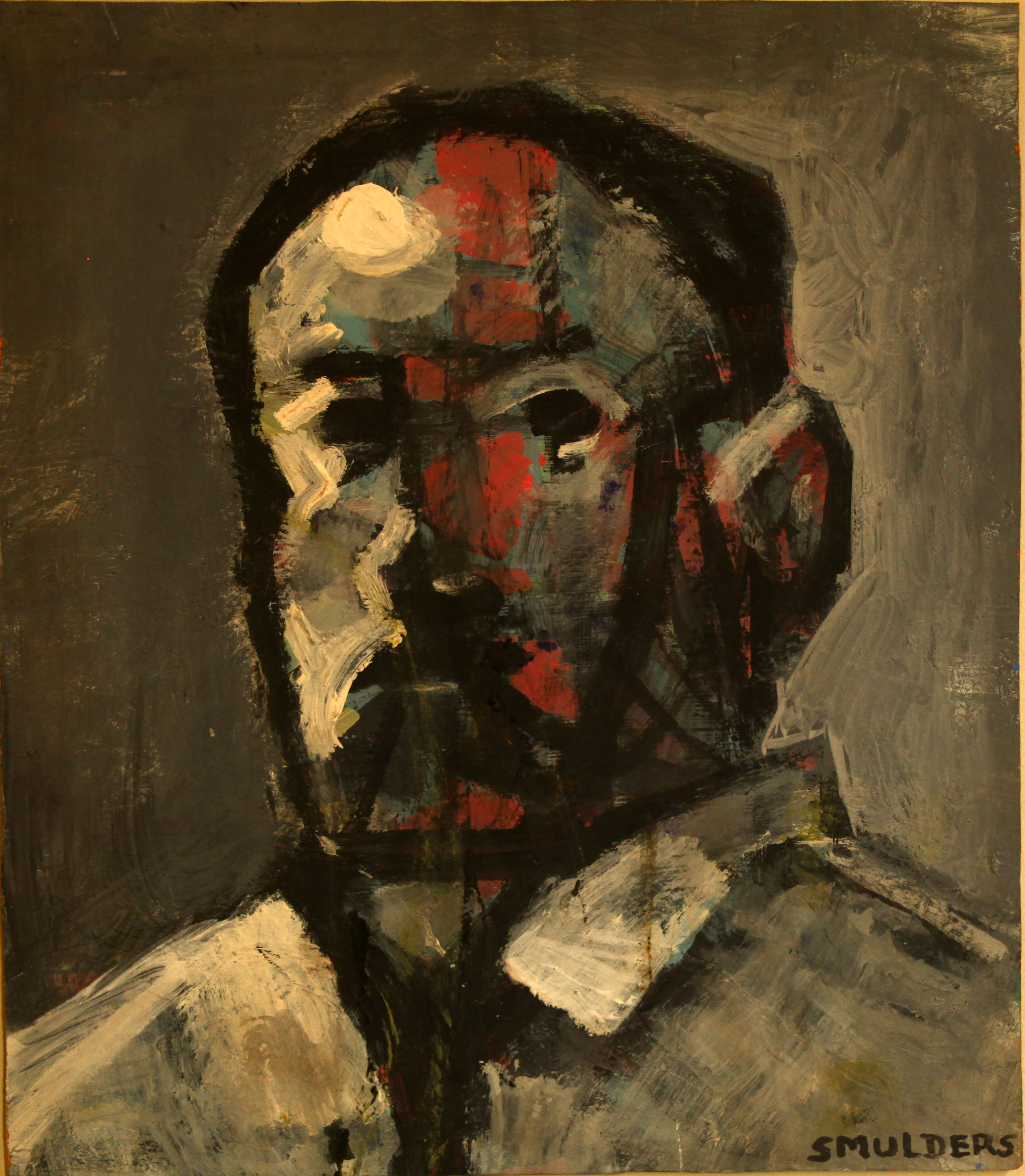 Zelfportret van Gab Smulders. Ik, de houder van het copyright, geef toestemming voor het uploaden naar wikimedia commons onder deze licentie.